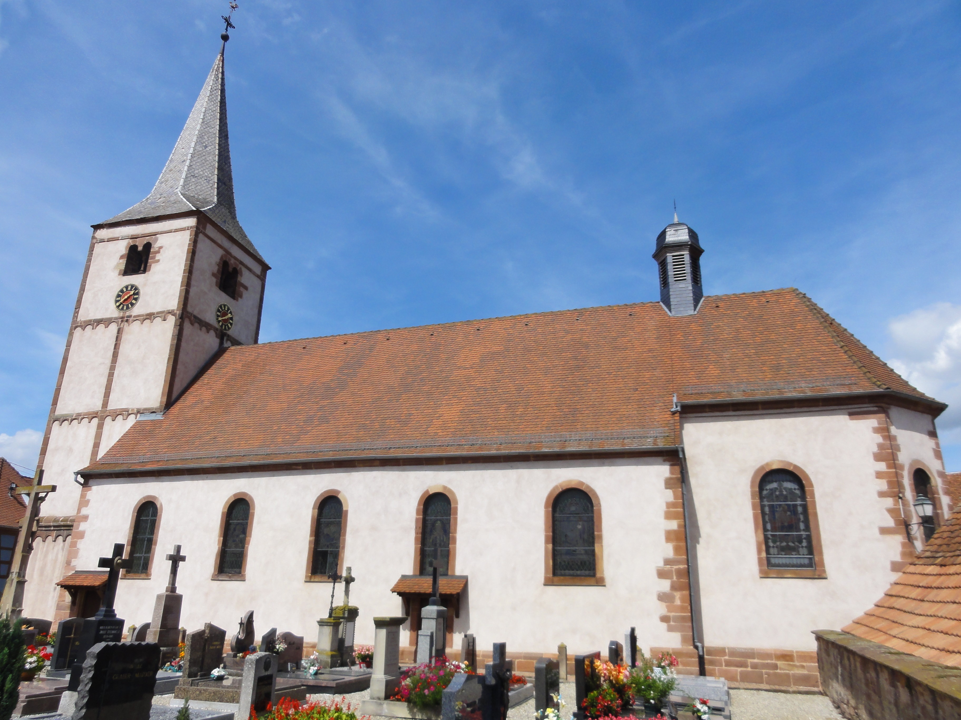 Alsace, Bas-Rhin, Église St Laurent de Gougenheim (IA67005582).